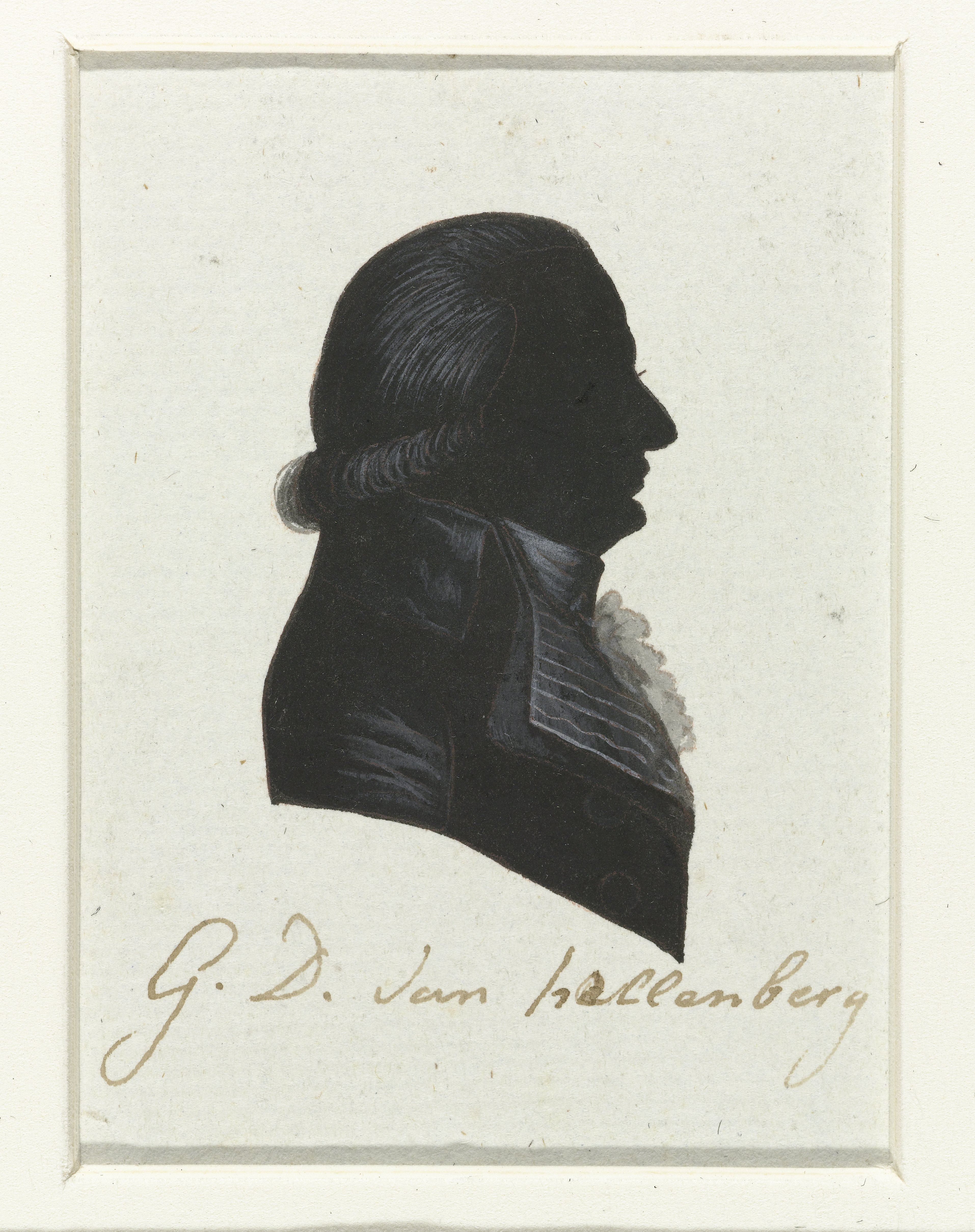 G.D. van Hellenberg. Tekening in Oost-Indische inkt, waarschijnlijk gemaakt door Hausdorff. De tekening behoort tot een serie van portretten van afgevaardigden naar de Eerste Nationale Vergadering in 1796-1797. Van de serie werden gravures gemaakt die zijn afgedrukt in "Geschiedenis der staatsregeling, voor het Bataafsche volk", een boek van Cornelius Rogge (1799).